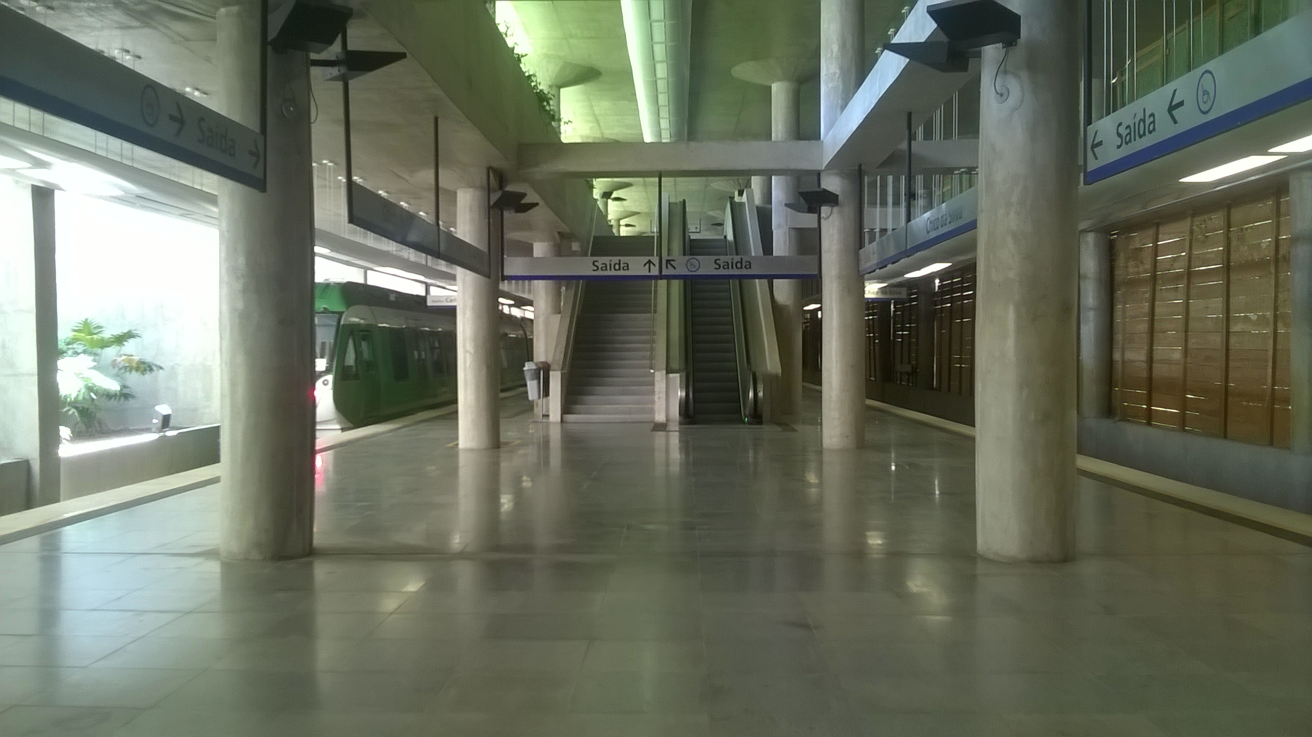 Plataforma da estação Central-Chico da Silva